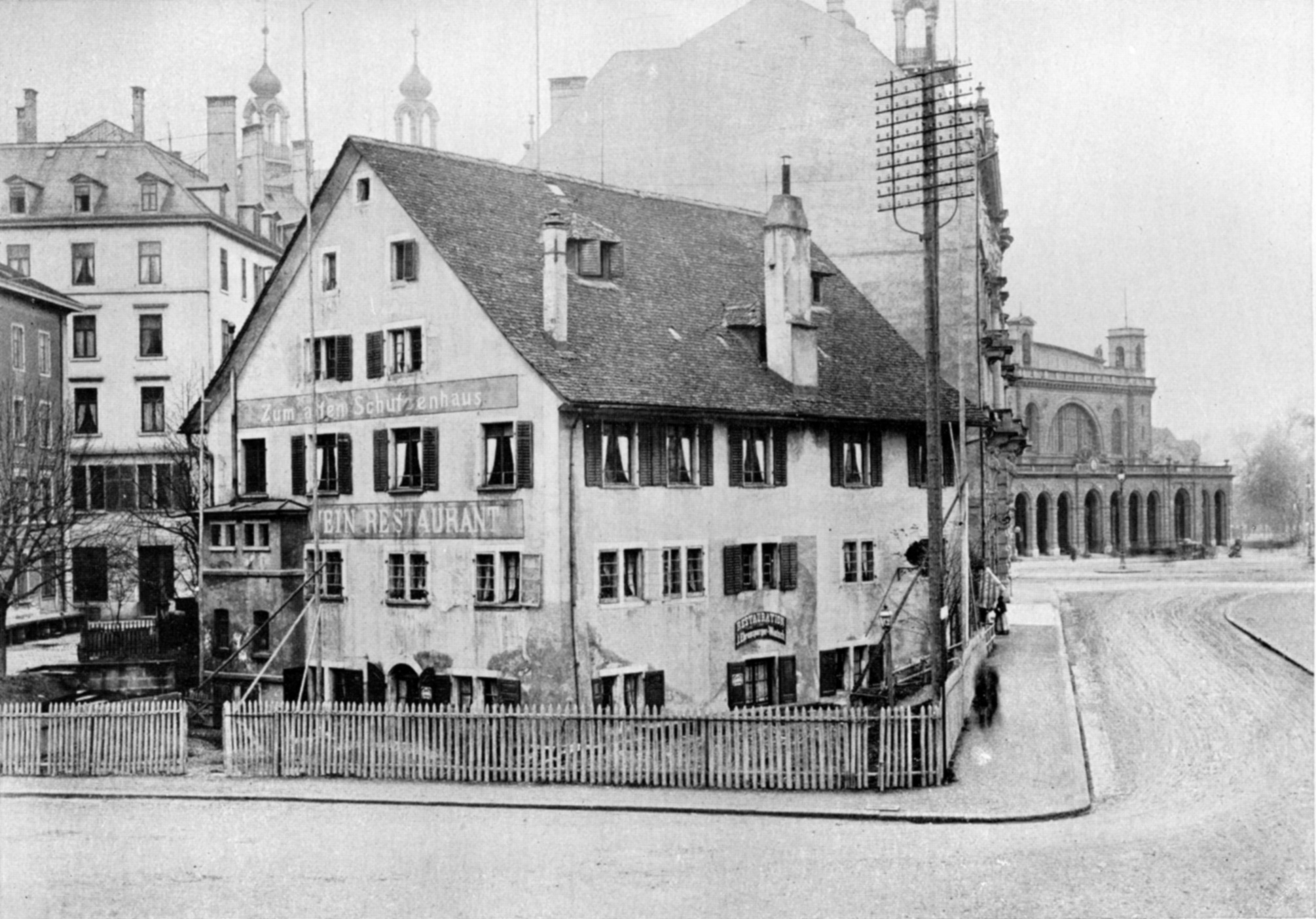 Das Restaurant zum alten Schützenhaus in Zürich. Abgebrochen 1899. In den 1850 und 1860er Jahren Versammlungsort der Zürcher Opposition aus Demokraten und Sozialisten im Kampf gegen das System des Eisenbahnkönigs Alfred Escher.